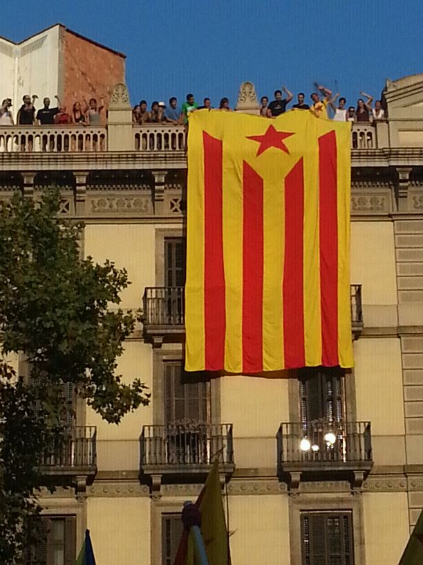 11s2012 Estelada a la Gran Via